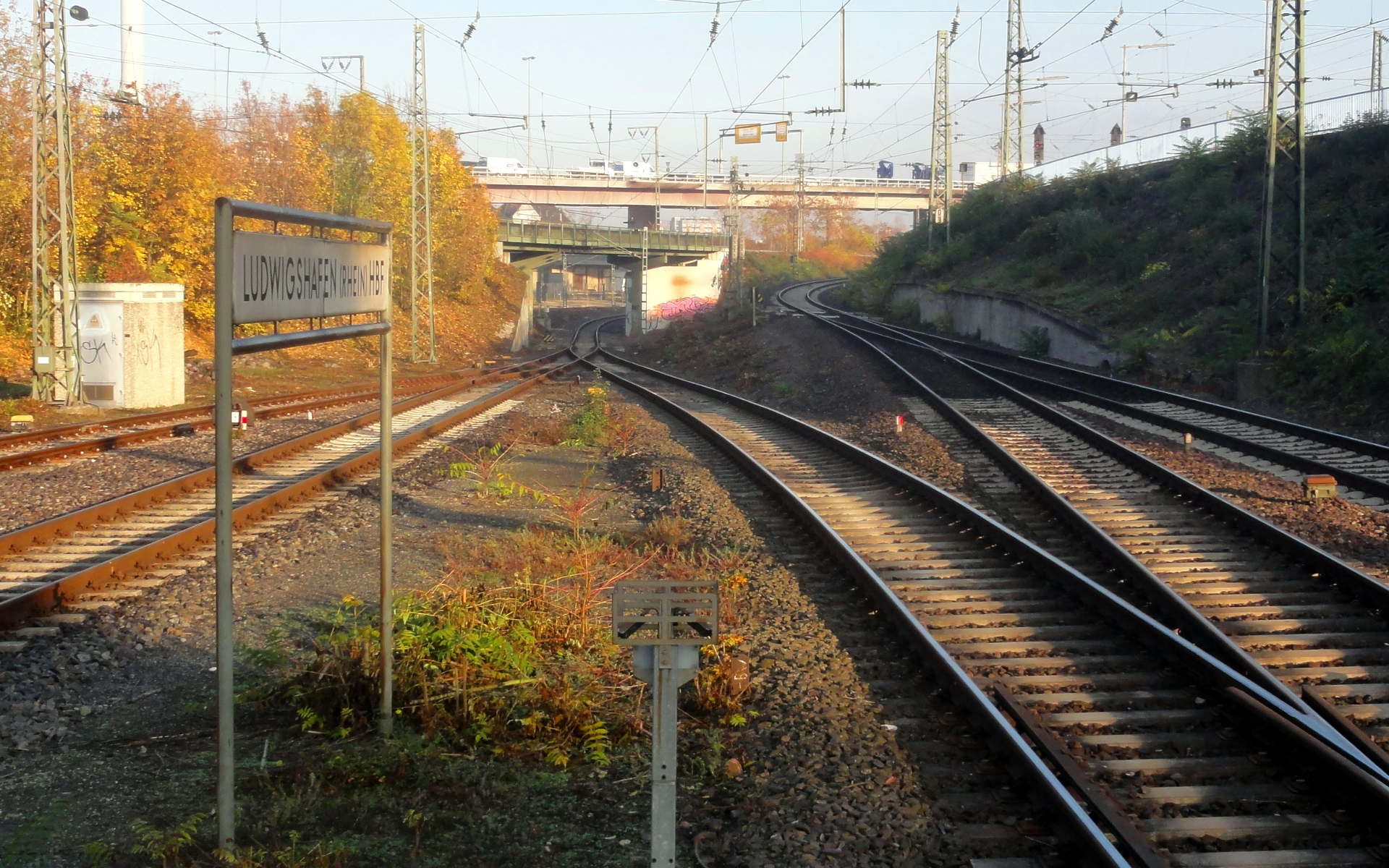 Strecke 3405 (links) und Gegenrichtungsgleis der Strecke 3410 (rechts). Vorne die Eisenbahnüberführung der Strecke 3404 vom Gbf (links) Richtung Worms, hinten die Brücke der Bundesstraße 44.